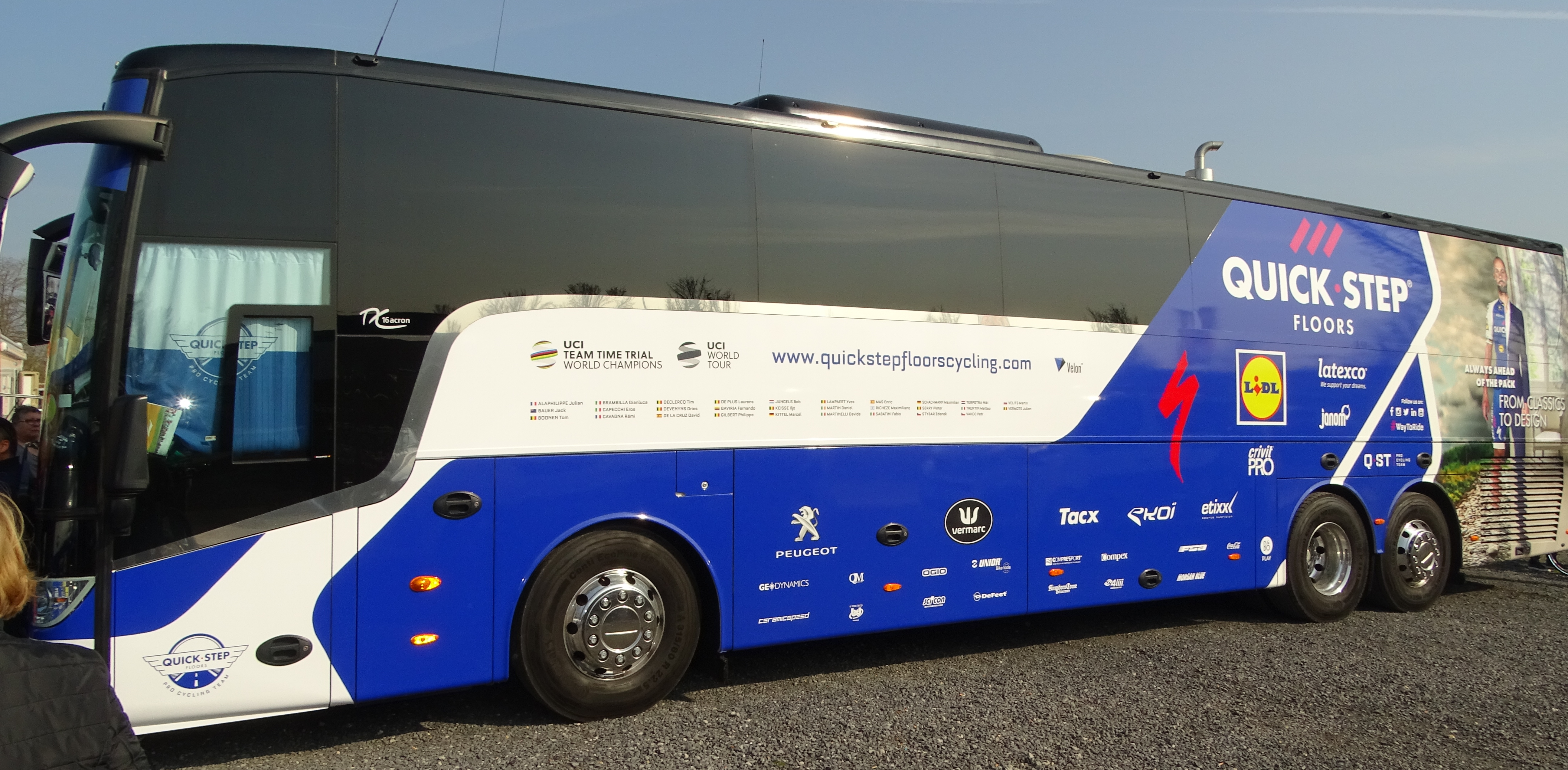 Reportage réalisé le mardi 28 mars à l'occasion de du départ de la première étape des Trois jours de La Panne 2017 à Adinkerque (La Panne), Belgique.